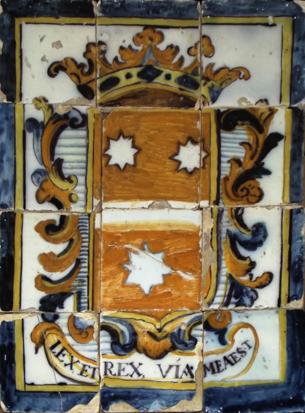 Escudo de los Sergeant, marqueses de Monteflorido